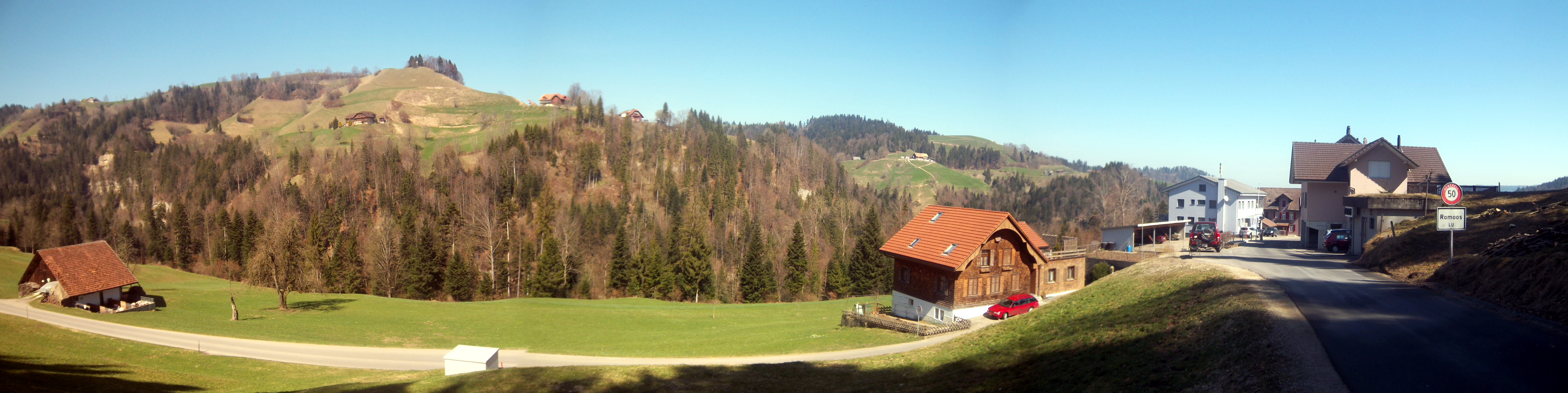 Vista panorámica de la comuna de Romoos, en el Cantón de Lucerna (Suiza).